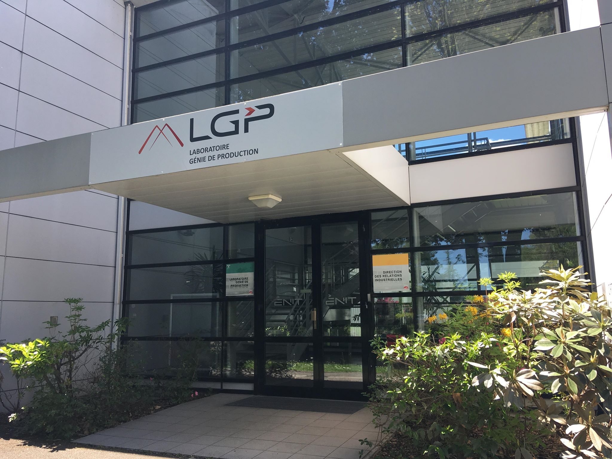 Entrée du Laboratoire Génie de Production avec le nouveau logo datant de 2018.